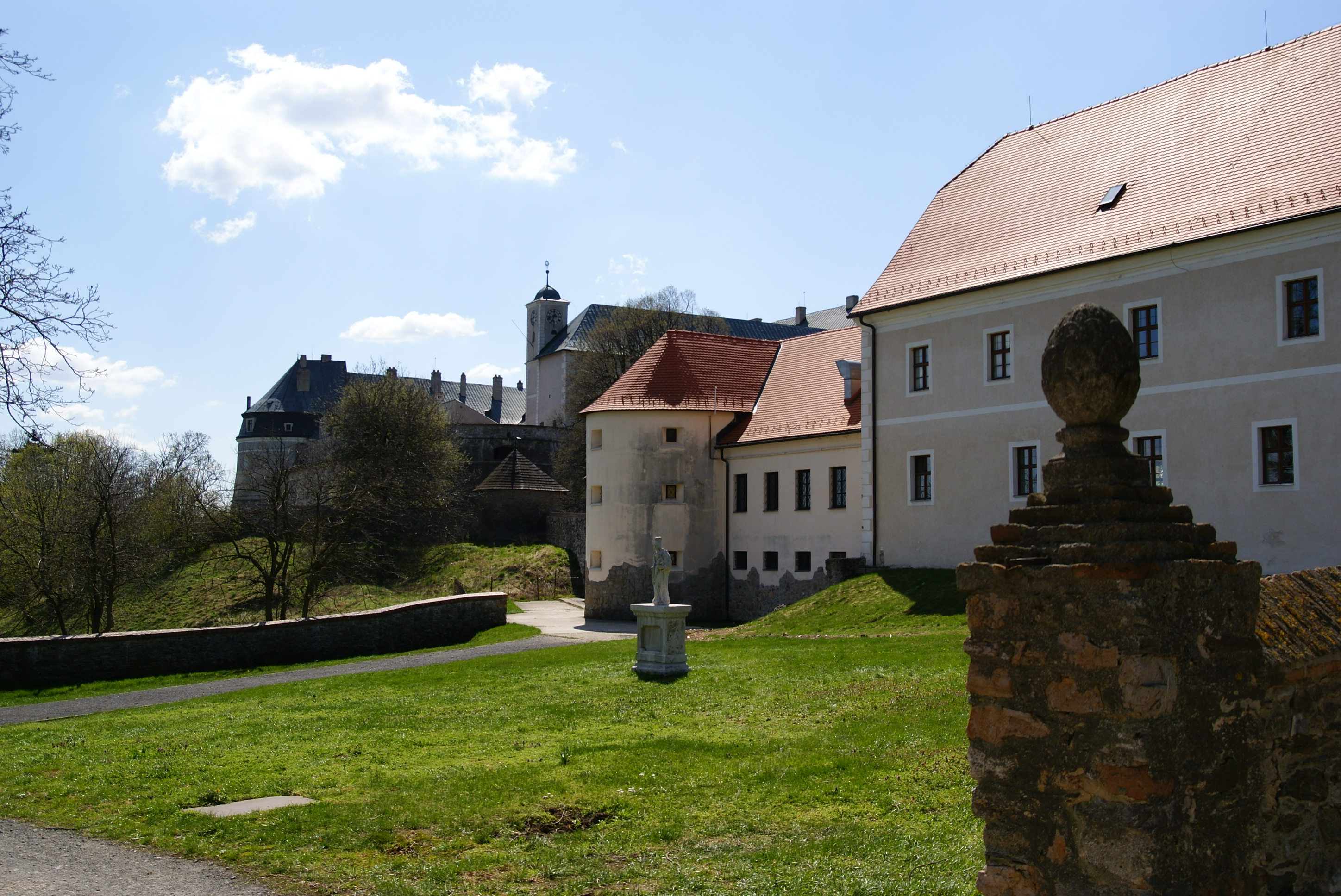 NÁDVORIE HRADNÉ